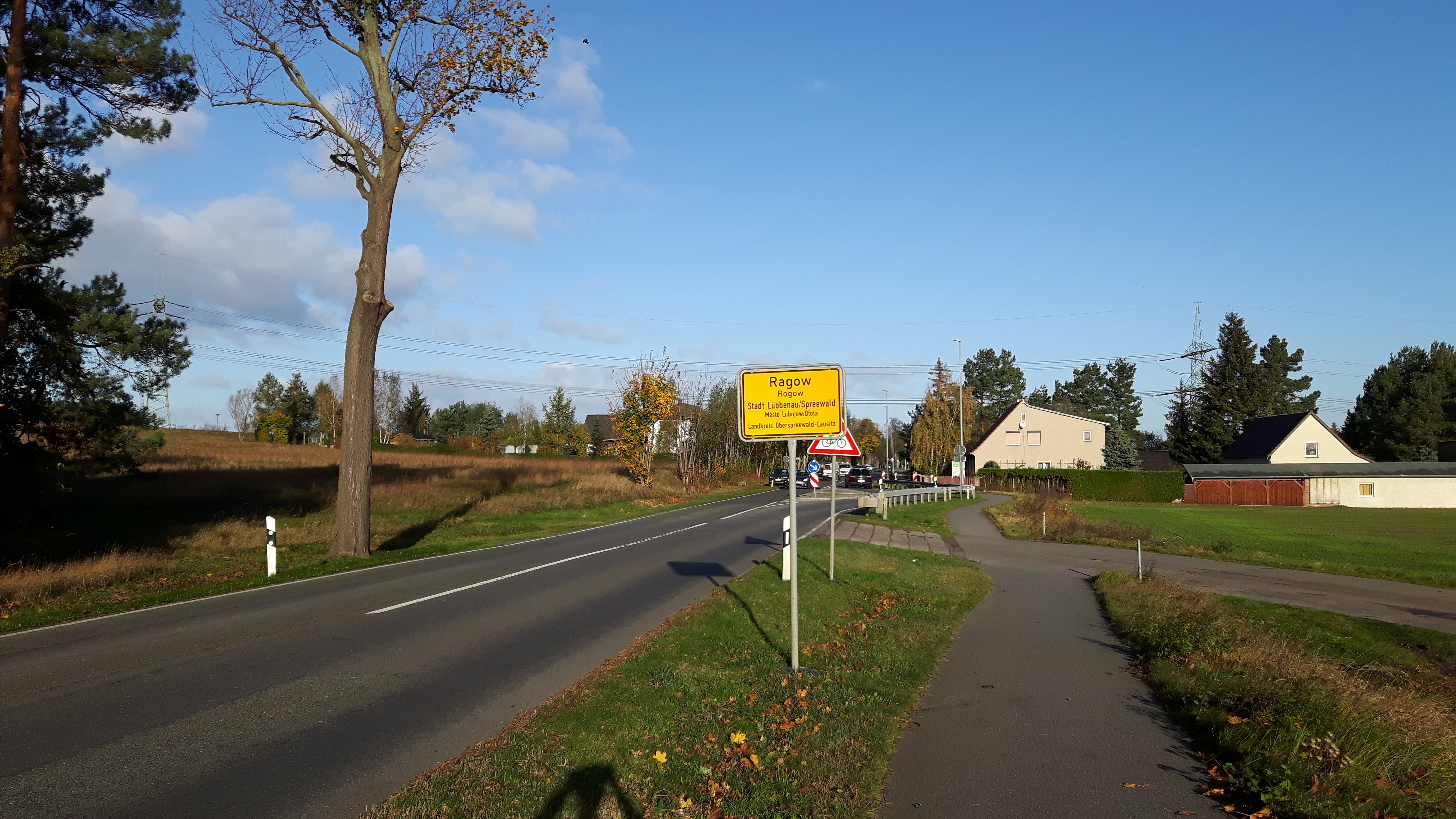 Ortseingang des Lübbenauer Ortsteils Ragow.